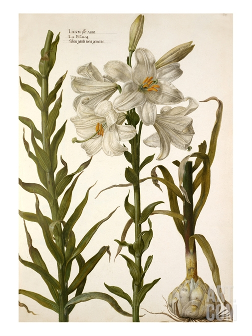 Illustration of Lilium longiflorum from "Verzameling van Bloemen naar de Natuur geteekend door Pieter van Kouwenhoorn"